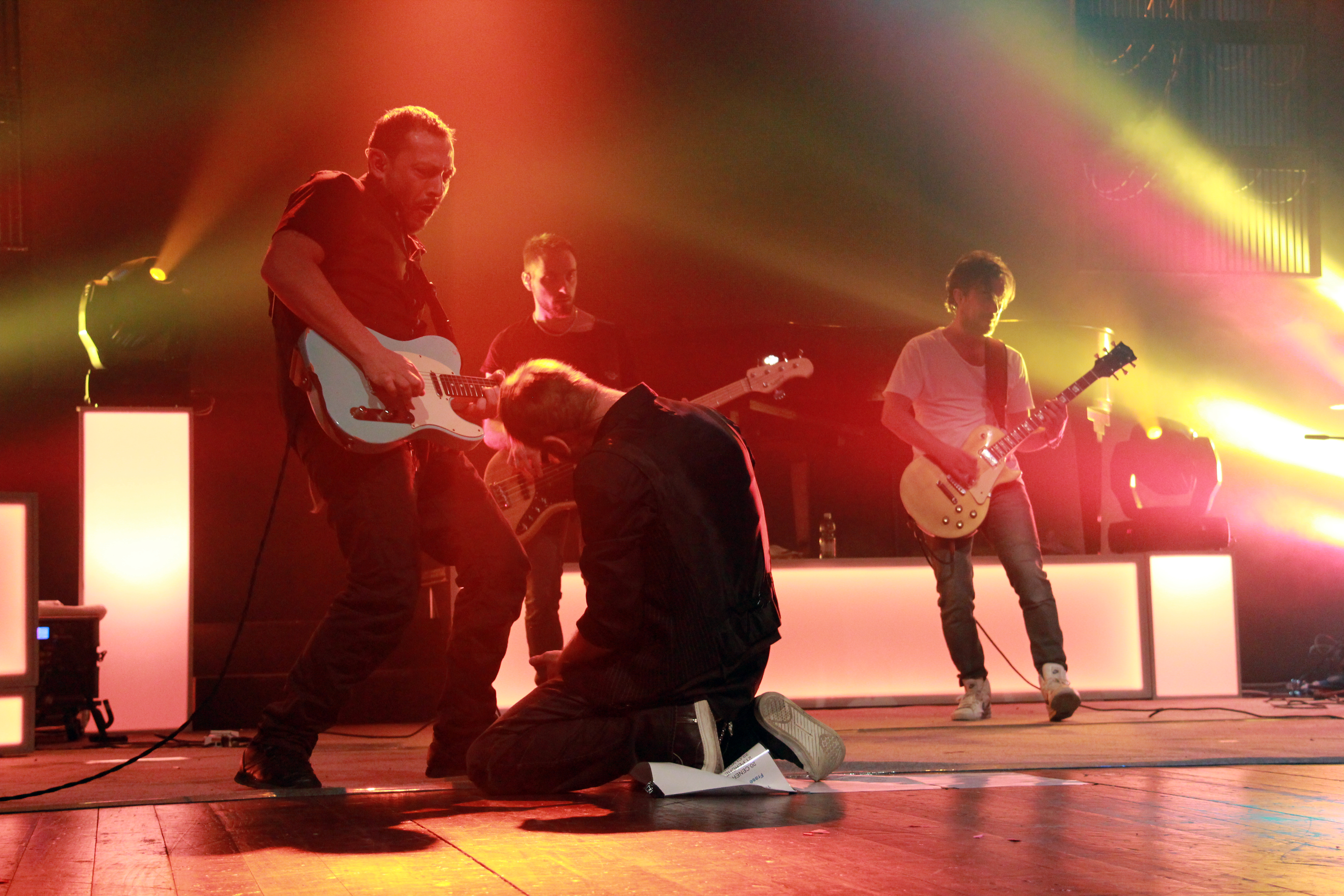 Marco Masini in tour a Torino il 24-04-2015